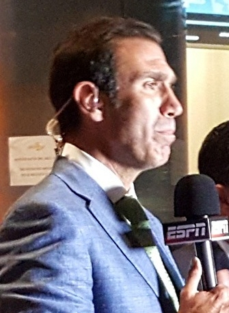 Transmisión de ESPN.